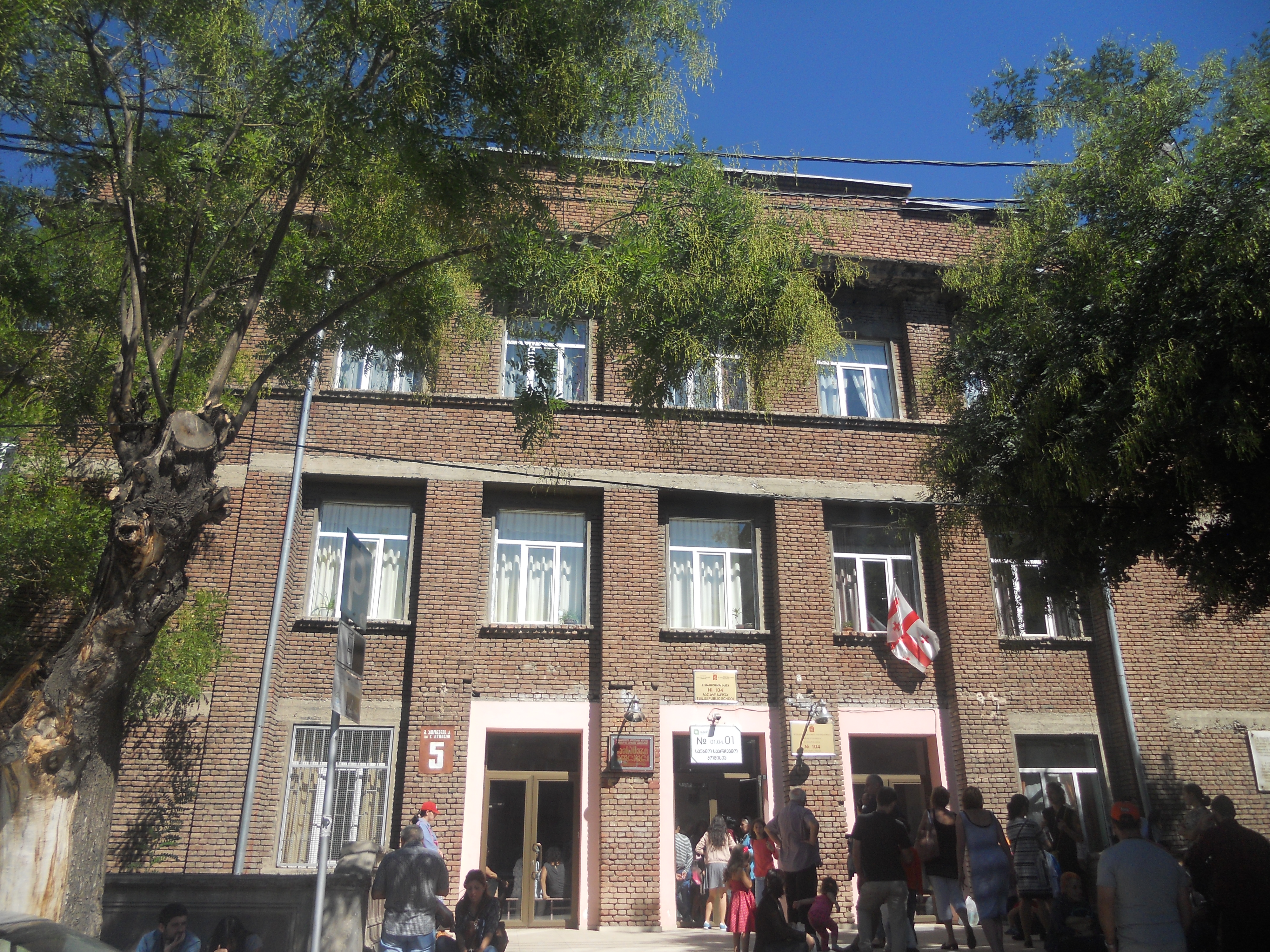 სკოლა